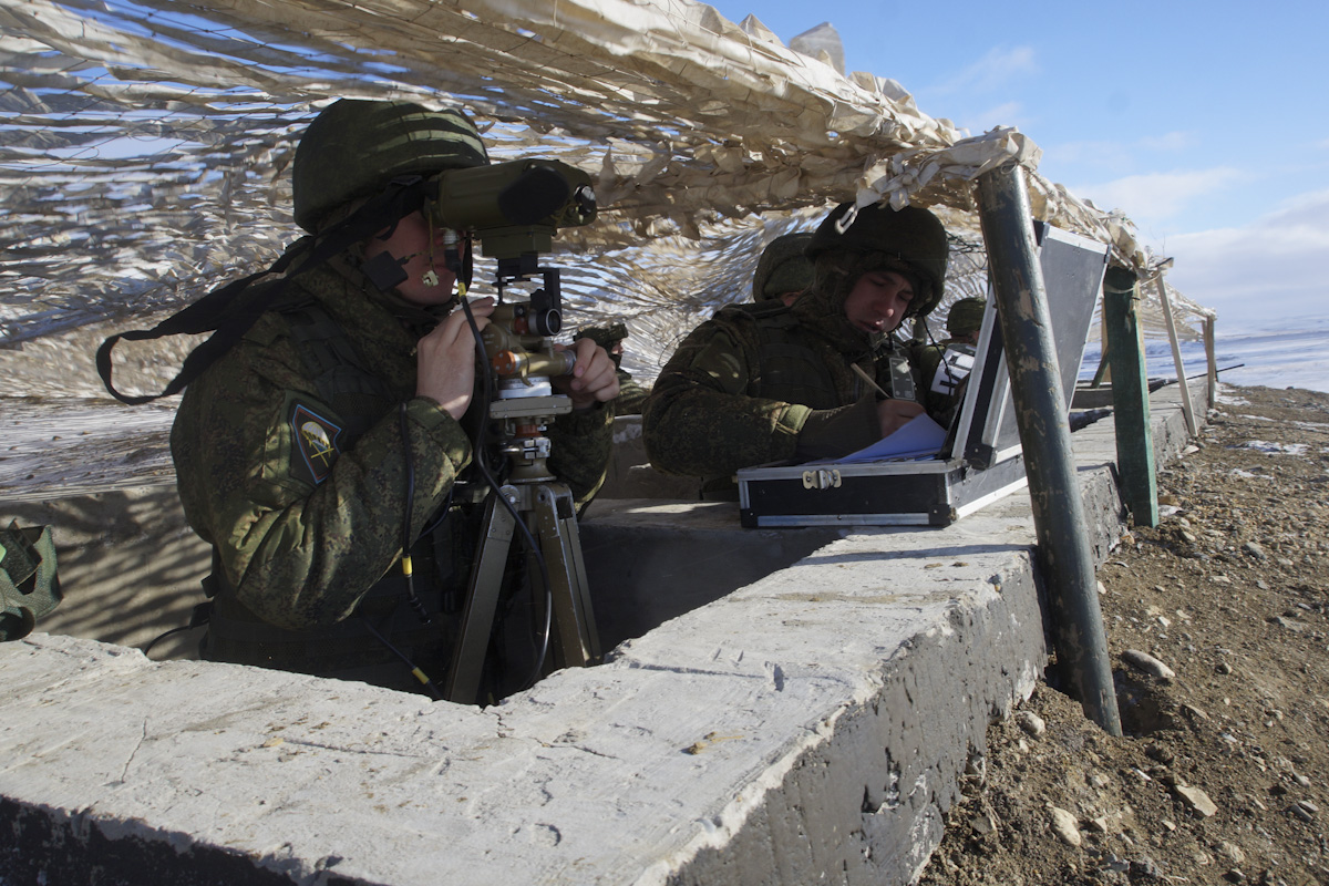 Тактическое учение с подразделениями 247-го гвардейского десантно-штурмового Кавказского казачьего полка в Ставропольском крае.